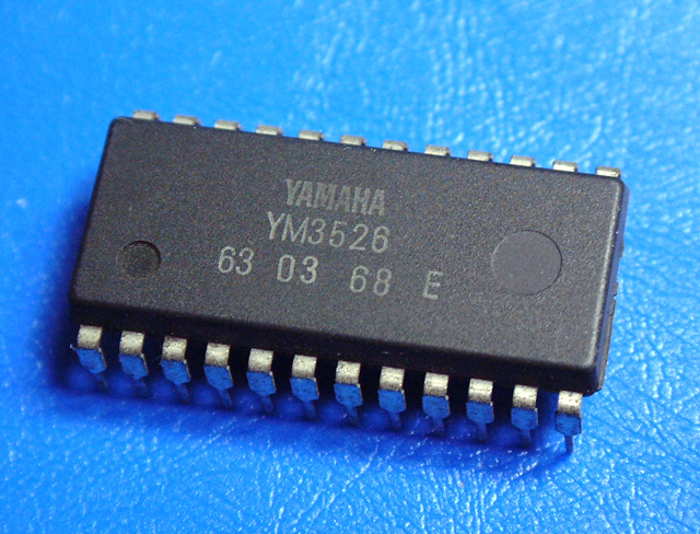 Микросхема звукогенератора Yamaha YM3526. Иллюстрация из , оригинал ru::ja:Image:YM3526_01.jpg